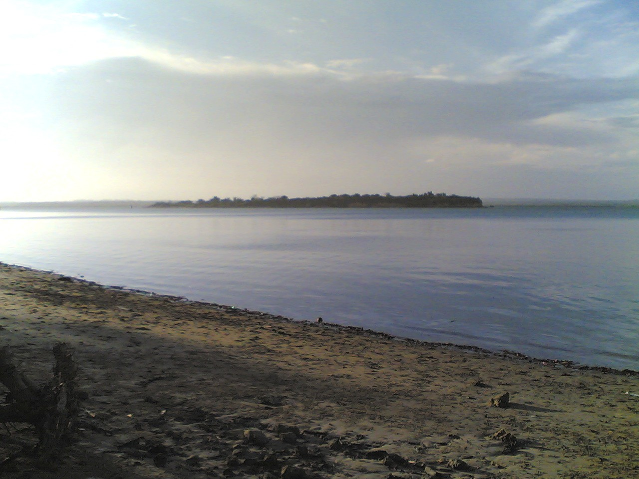 Toten Island in Tanga, Tanzania